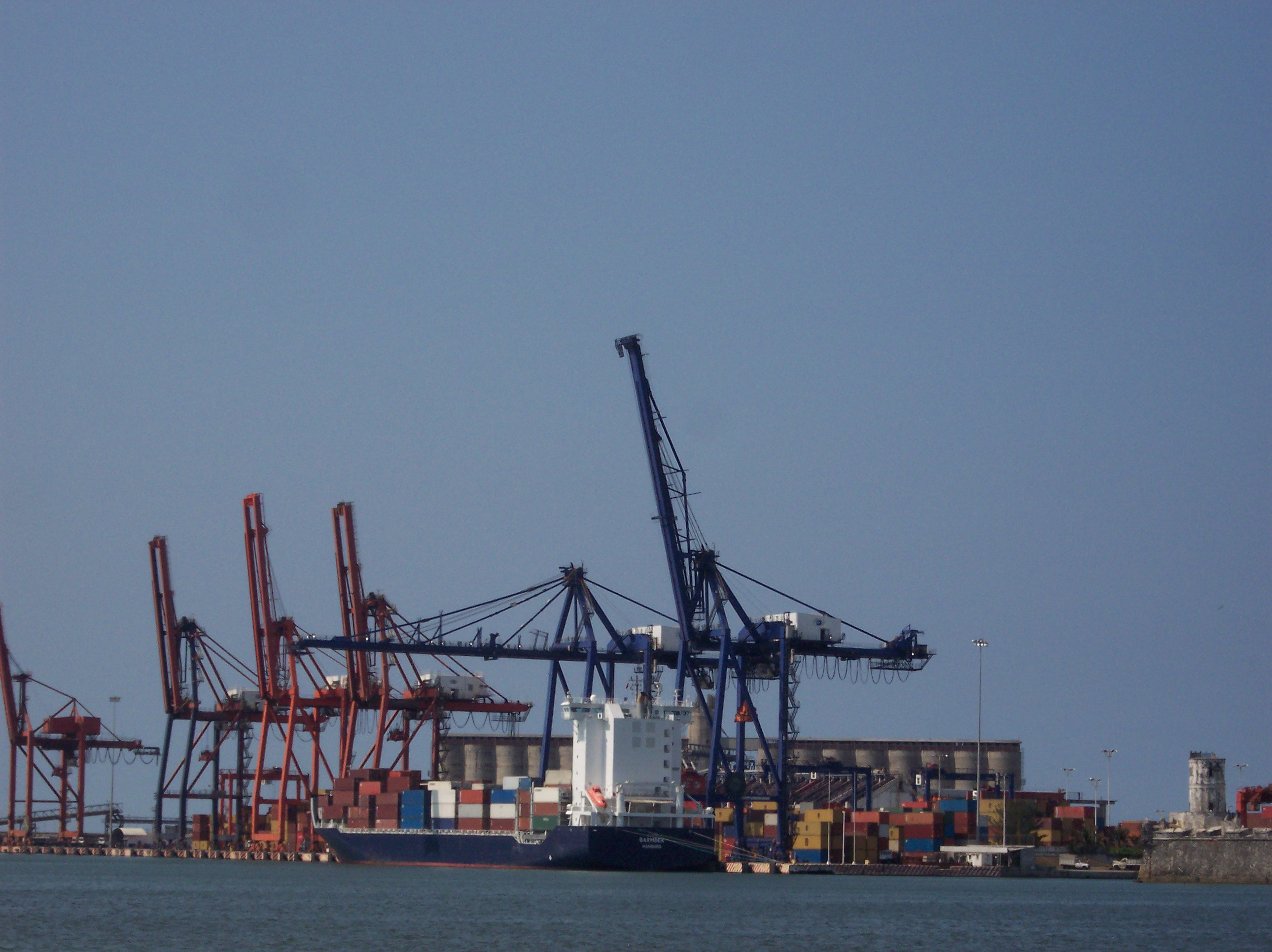 M/V Barmbek and a detail of the port in Veracruz. Photograph taken from the jetty. IMO Number: 9313228 Length: 169 m Beam: 27 m SPANISH: Detalle del Puerto de Veracruz. Fotografía desde el malecón. Port and City of Veracruz. Estate of Veracruz, Mexico. SPANISH: Ciudad y Puerto de Veracruz, Estado de Veracruz, México.